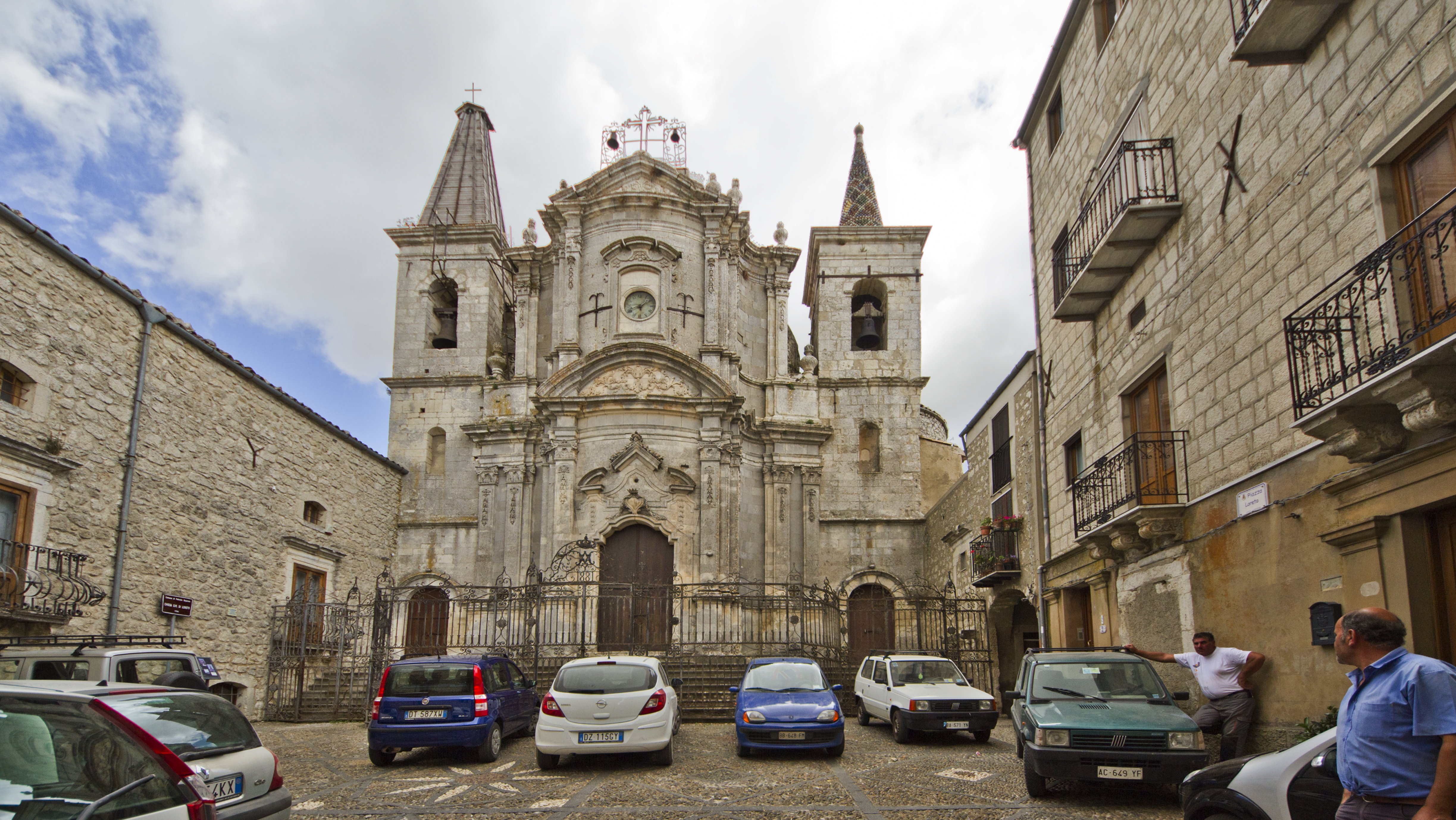 90026 Petralia Soprana PA, Italy